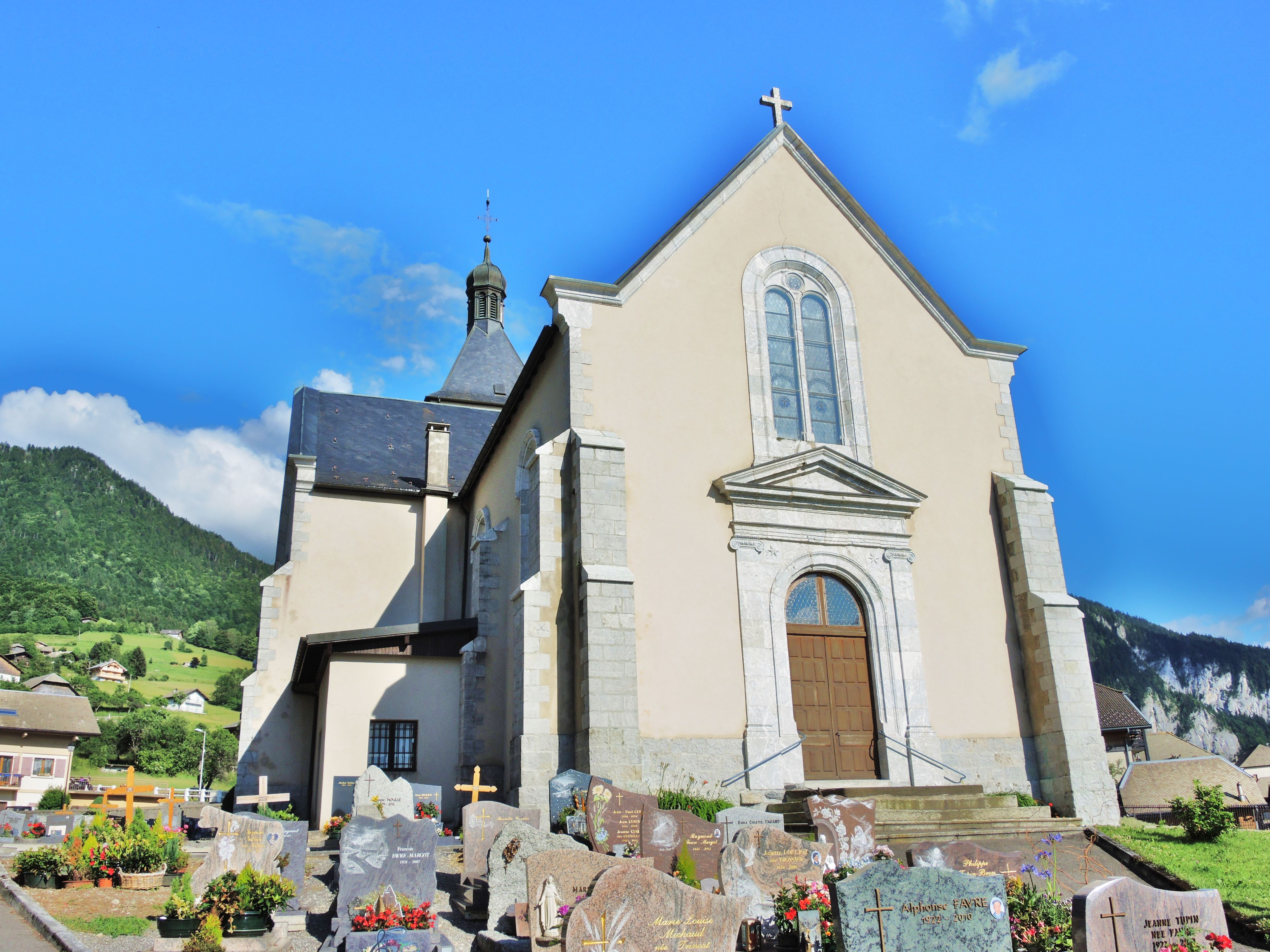 Eglise saint Etienne de Vacheresse.